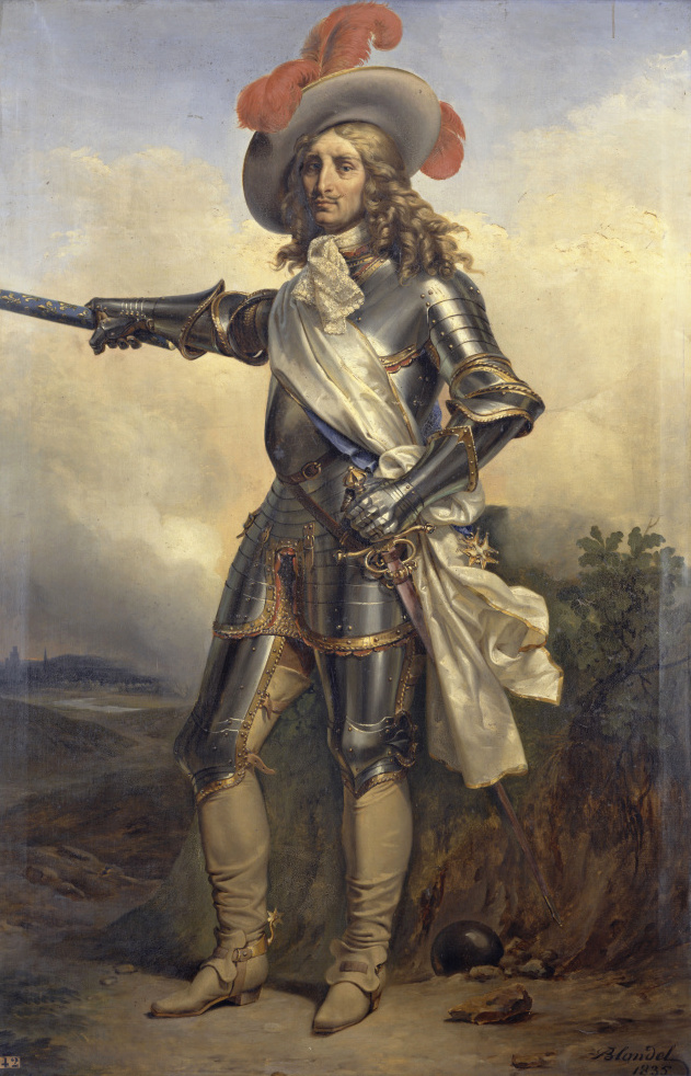 Portrait of Guy Aldonce de Durfort de Lorges (1630-1702)